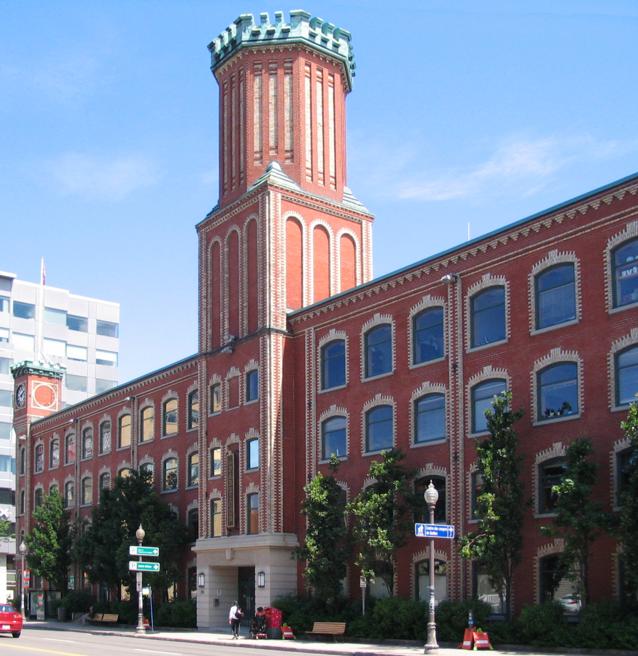 Édifice La Fabrique, l'ancienne Dominion Corset, à Québec